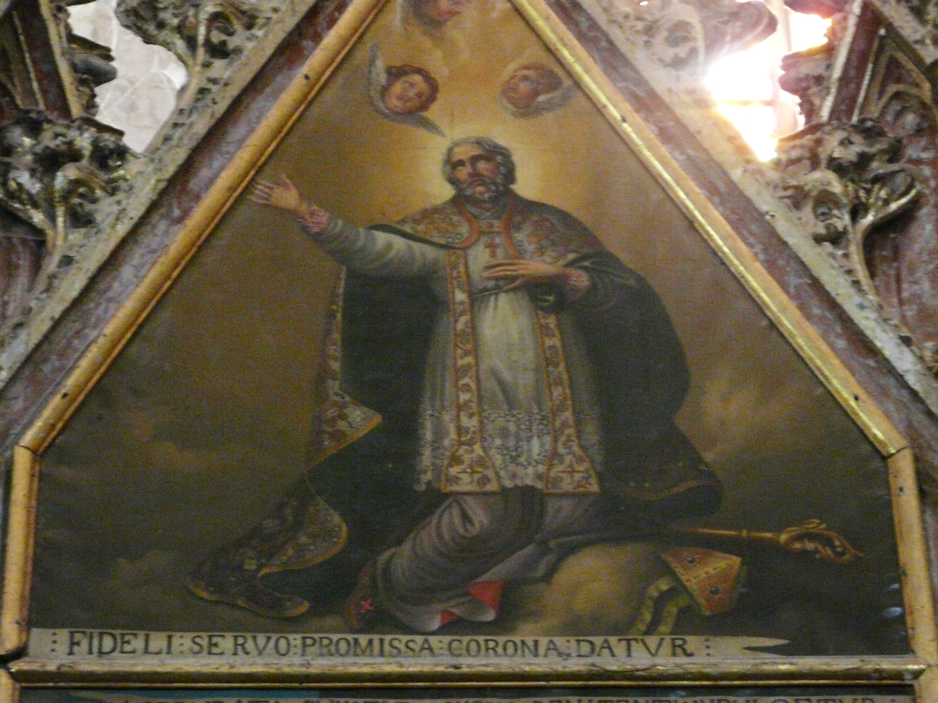 Détail du panneau nord du tombeau de saint Bertrand, cathédrale Notre-Dame, Saint-Bertrand-de-Comminges, Haute-Garonne, France.